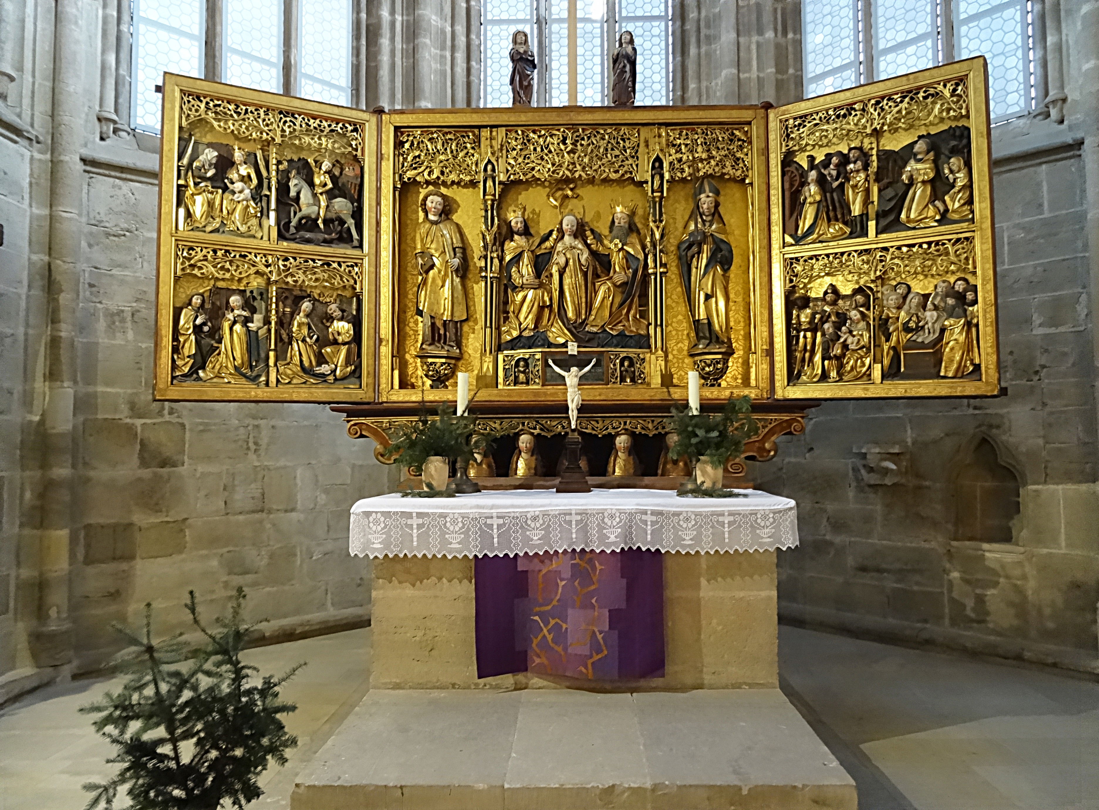 Der Flügelaltar von Jacob Naumann in der Liebfrauenkirche Arnstadt von 1498 zeigt die Krönung Marias mit dem hl. Laurentius (links) und dem hl. Bonifatius (rechts) und stand ursprünglich in der Oberkirche. Er wurde im Jahre 1642 von der Oberkirche hierher gebracht, weil dort ein neuer vom Grafen Günther XLII. von Schwarzburg gestifteter aufgestellt wurde.